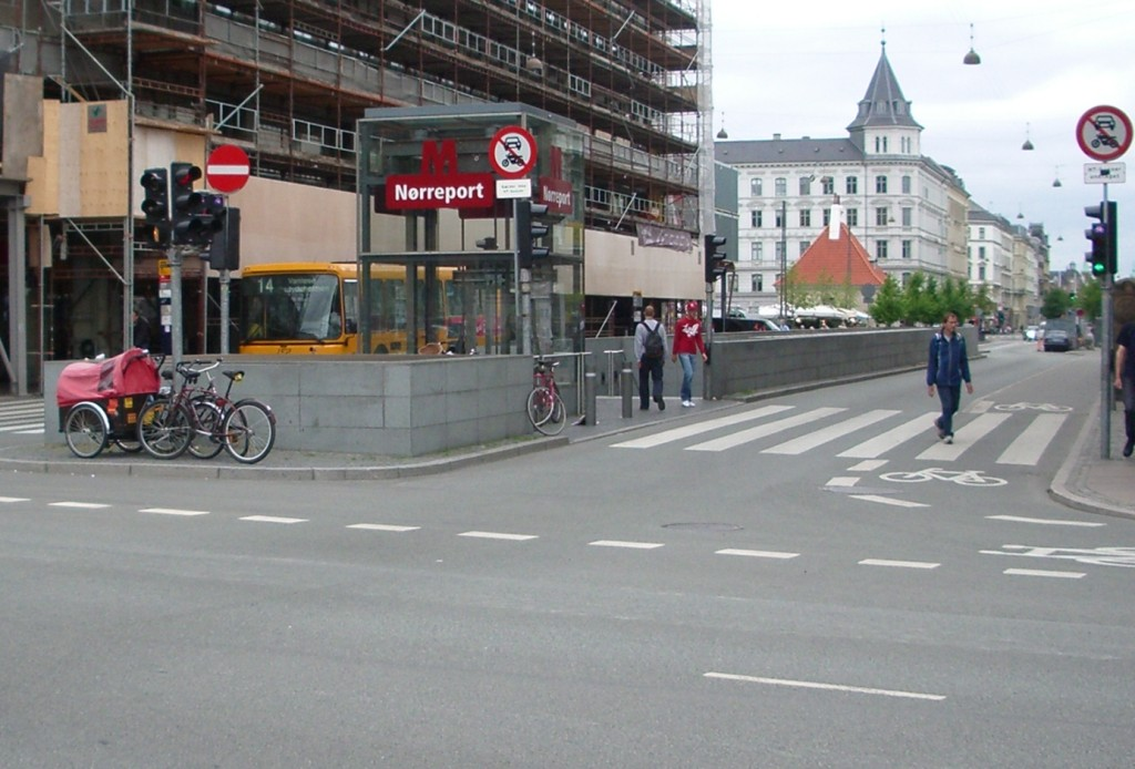 Nørreport Metro station entrance